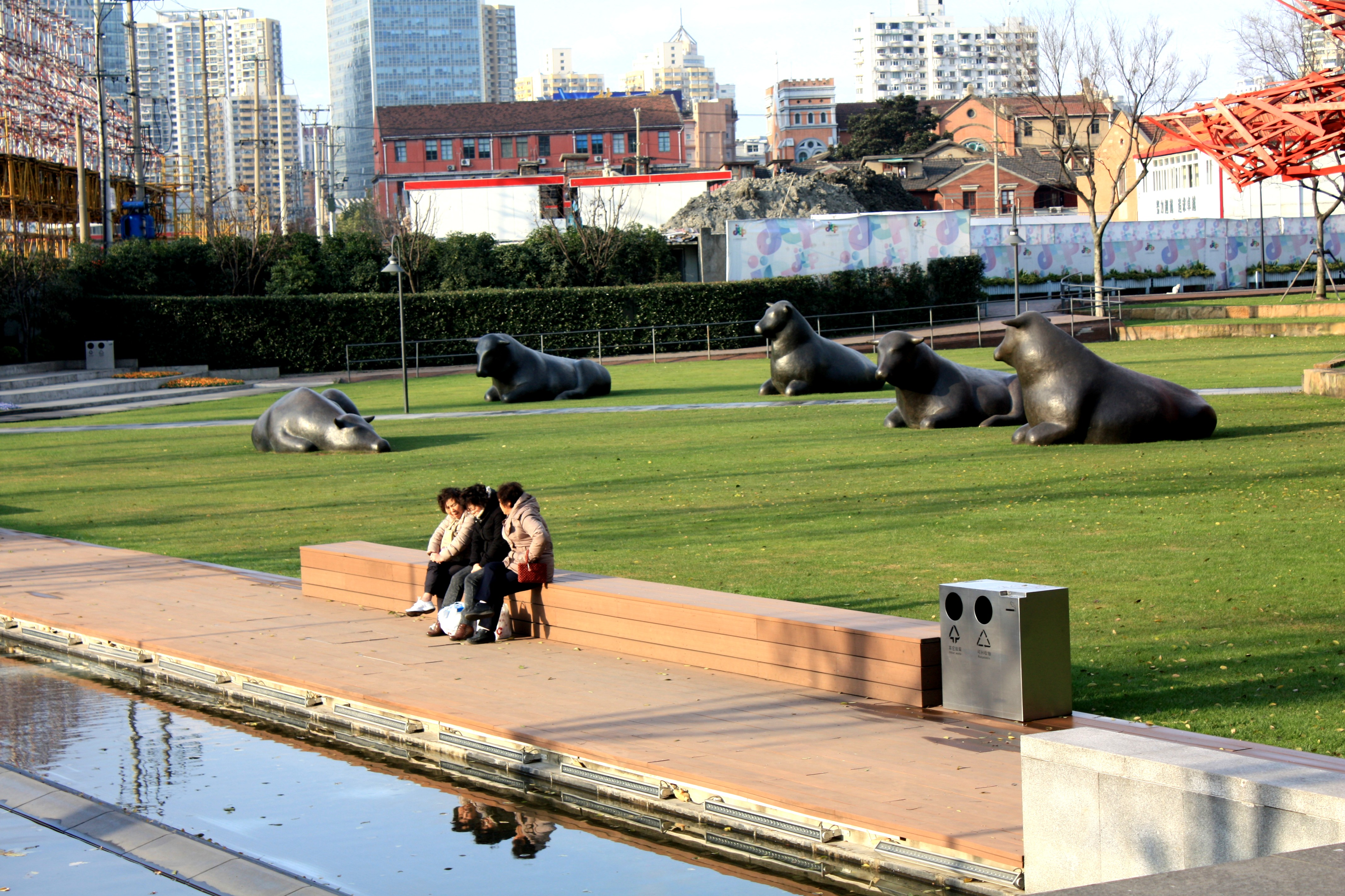 Jing'an Sculptures Park, Shanghai, Skulptur von Peter Woytuk, The Everlasting Moment on the Plain